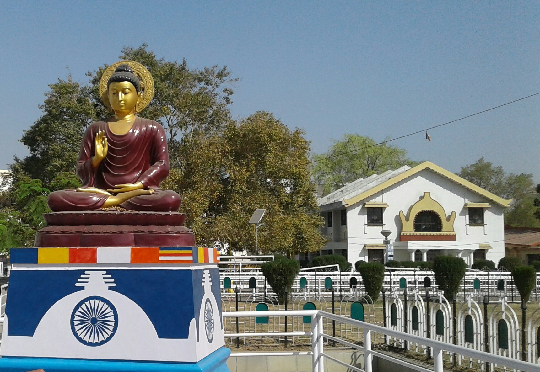 दीक्षाभूमी मधील तथागत बुद्धांची मुर्ती